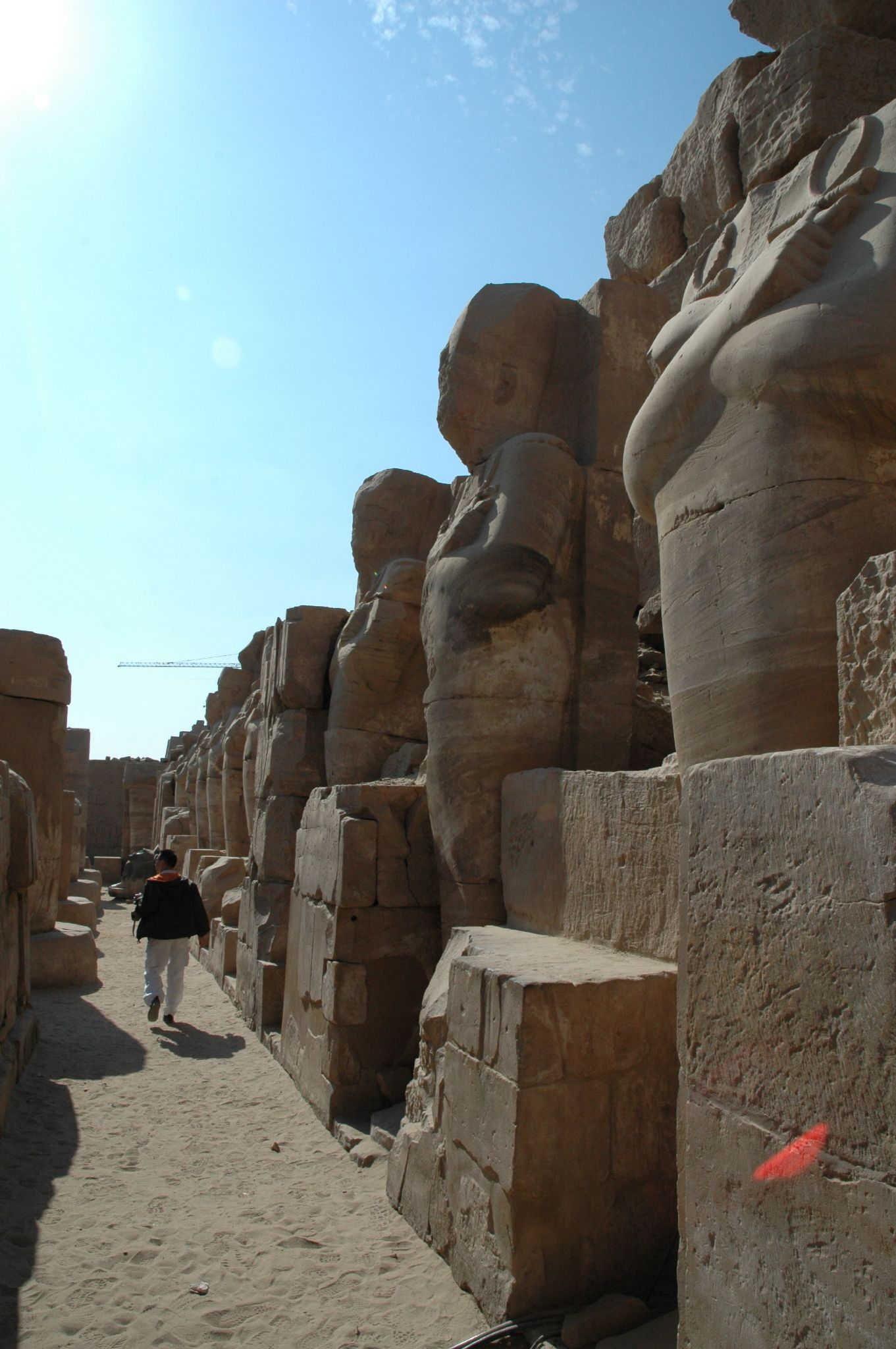 Tempio di Karnak: uno dei Piloni